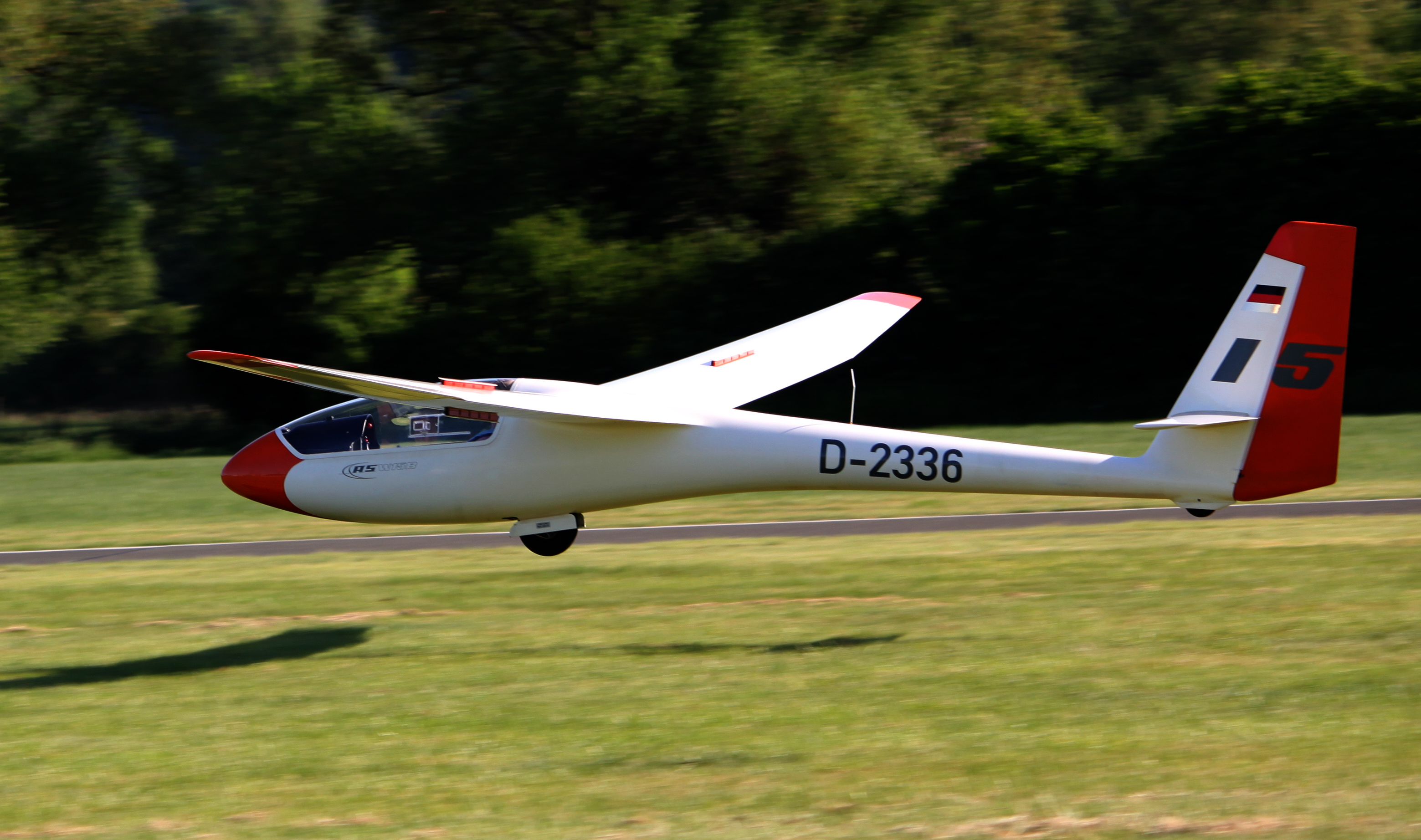 Flugplatz Rinteln, Landung ASW15B als Segelflugzeug